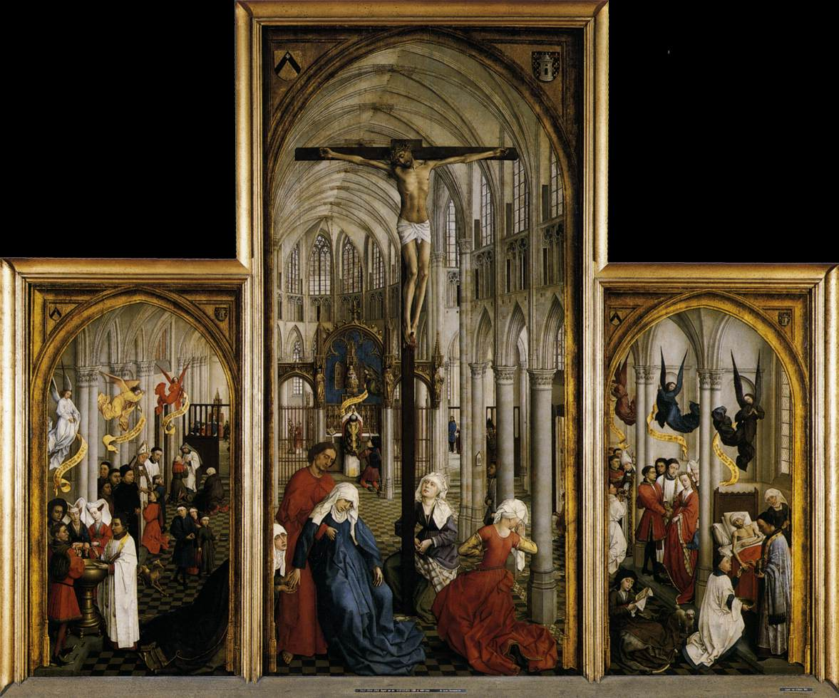 de zeven sacramenten zijn gerangschikt rond een calvarie die hier gesitueerd wordt in de middenbeuk van een gotische kerk. Boven elk sacrament zweeft een engel met een banderol in de handen. In de achtergrond van het middenpaneel houdt een priester een hostie op tijdens de consecratie, waardoor het offer van Christus herhaald wordt. Op het linkerpaneel worden het doopsel, het vormsel en de biecht uitgebeeld. Het rechterpaneel toont de priesterwijding, het huwelijk en de ziekenzalving. De personen op het middenpaneel zijn groter dan die op de zijpanelen: ze zijn belangrijker en van een andere orde. Hun kleurige gewaden richten de aandacht op de voet van het kruis. Als tegenstelling kan men twee bedelaars onderscheiden tussen de zuilen. In de bovenhoeken van de gouden imitatielijsten staan wapenschilden: rechts dat van de stad Doornik en links dat van de Doornikse bisschop Jean Chevrot. Vermoedelijk wordt hij geprotretteerd in de bisschop die het vormsel toedient. Meer dan waarschijnlijk was hij ook de besteller van het stuk.